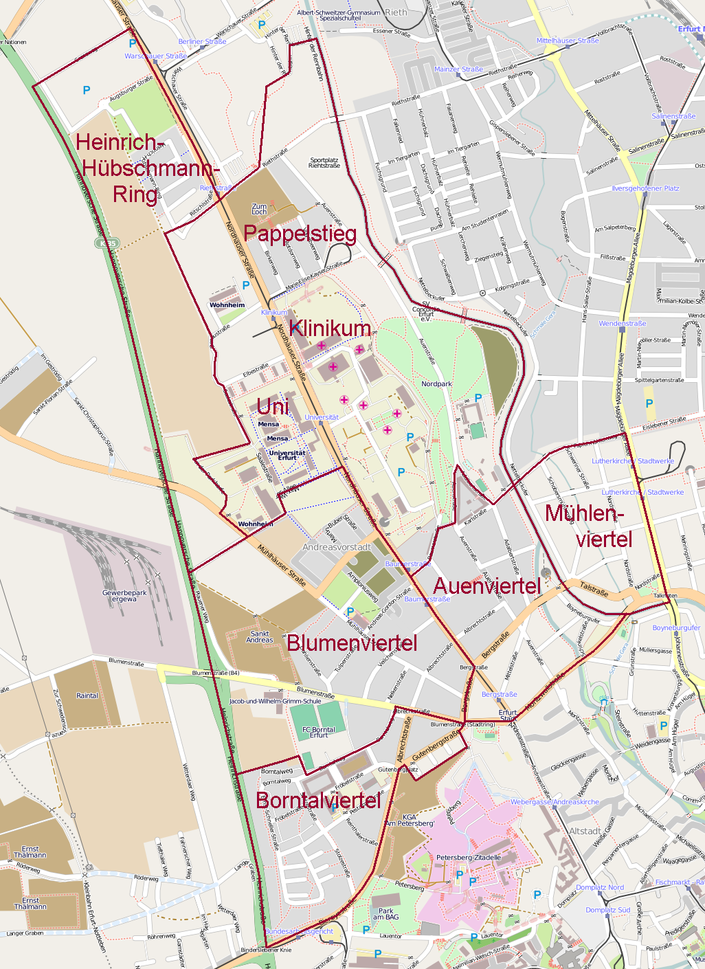 Eine Karte der Viertel im Stadtteil Andreasvorstadt von Erfurt.